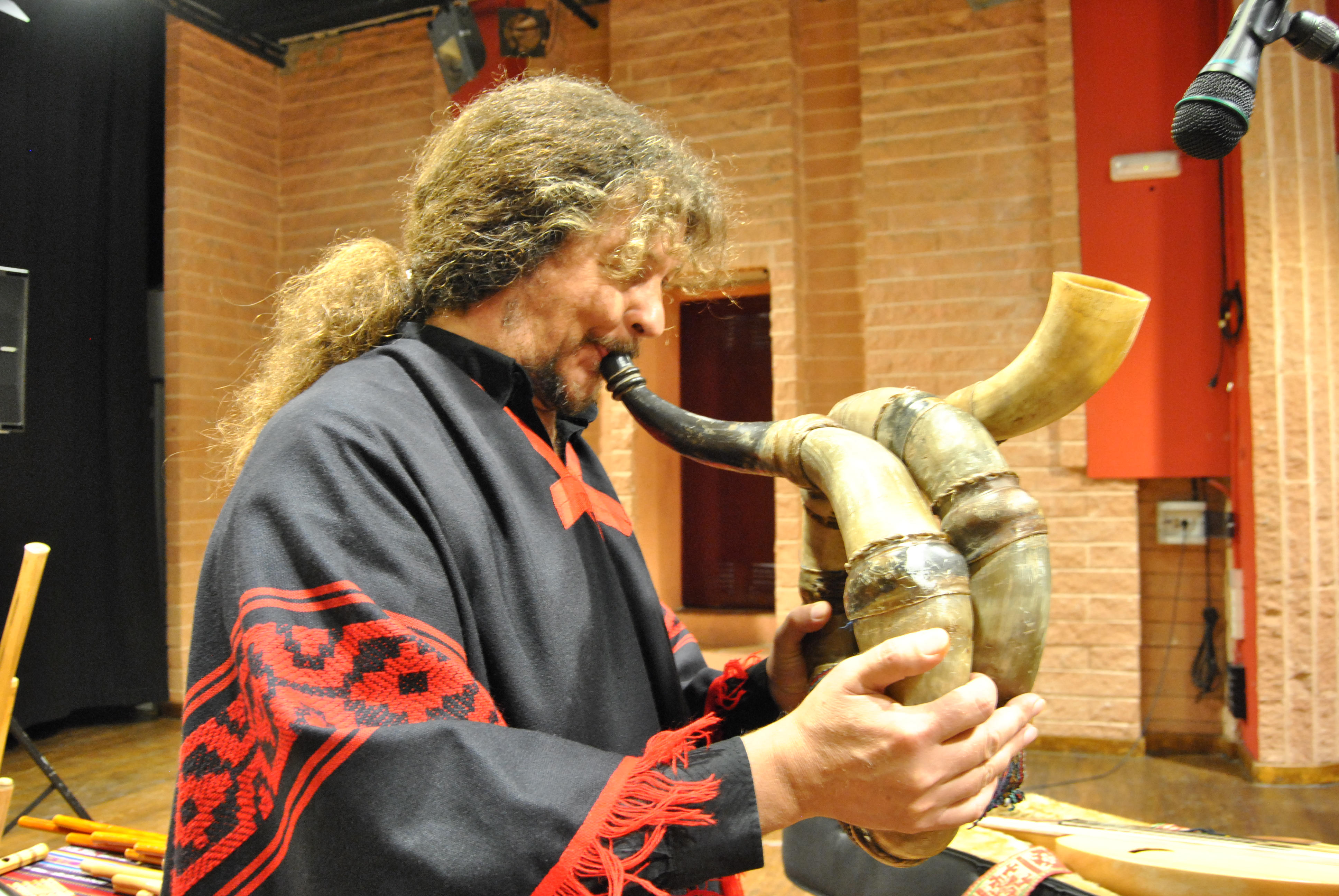 Musico tocando la trompeta wajarapuco